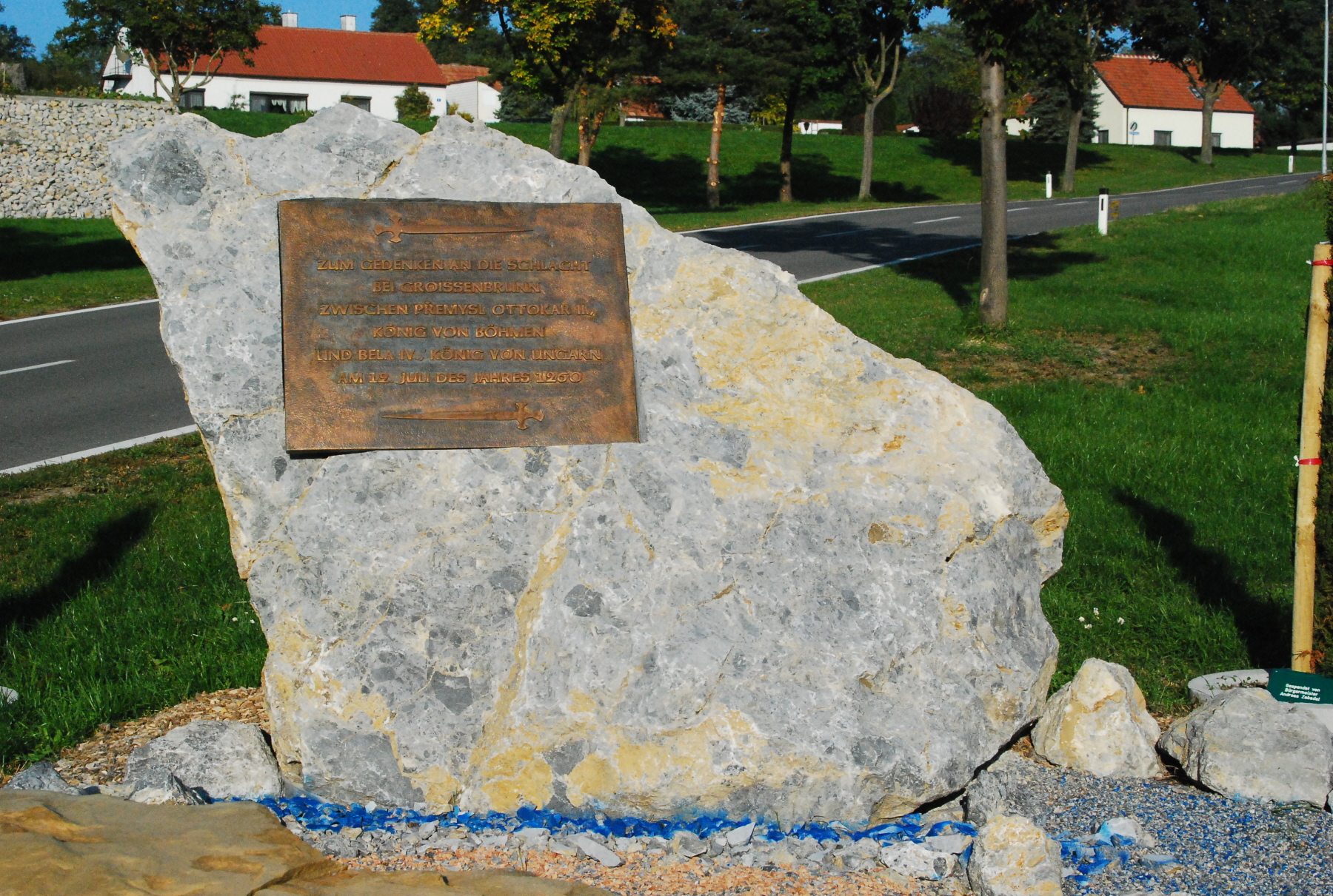 Denkmal zur Erinnerung an die Schlacht bei Groißenbrunn im Jahr 1260. Text auf der Tafel: „Zum Gedenken an die Schlacht bei Groissenbrunn zwischen Přemysl Ottokar II., König von Böhmen und Bela IV. König von Ungarn am 12. Juli des Jahres 1260“